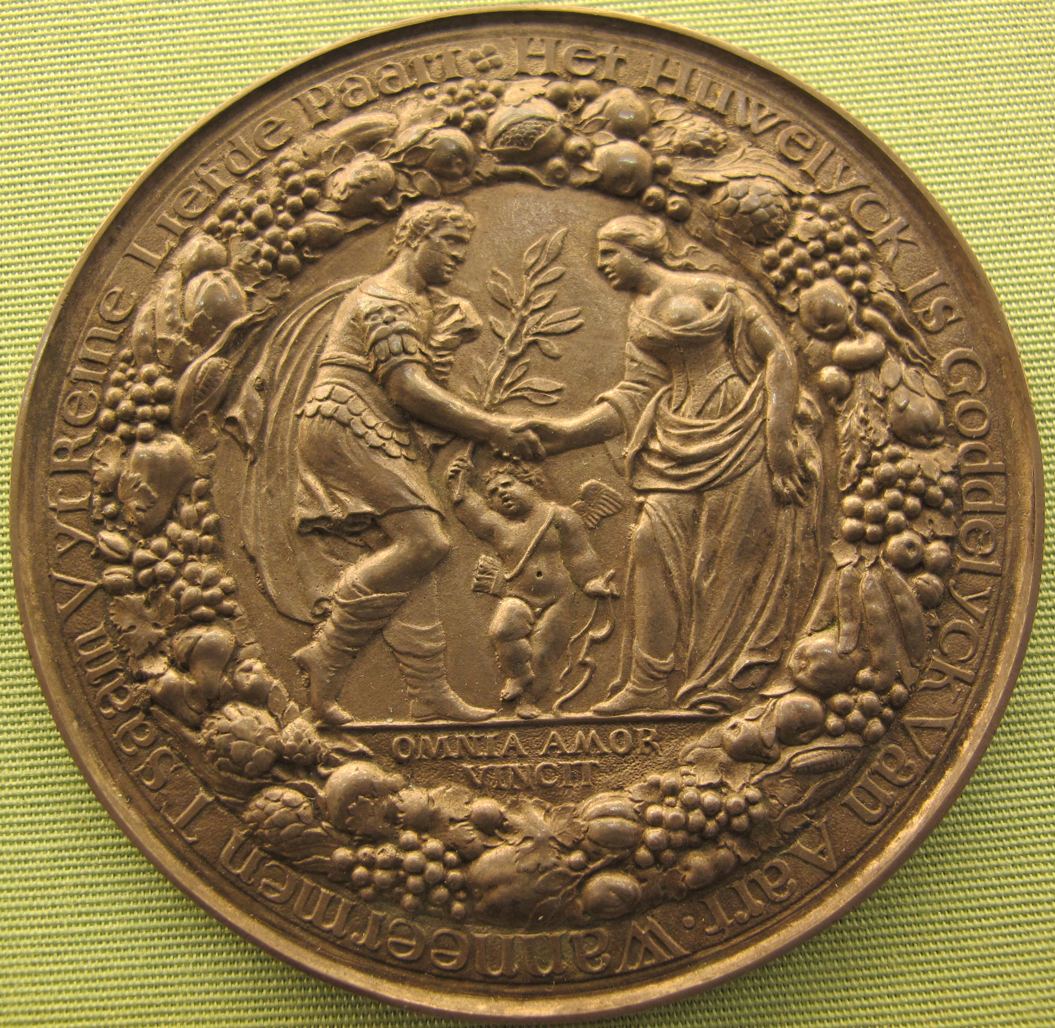 Pieter van abeele, medaglia matrimoniale (ehemedaille), 1660 ca